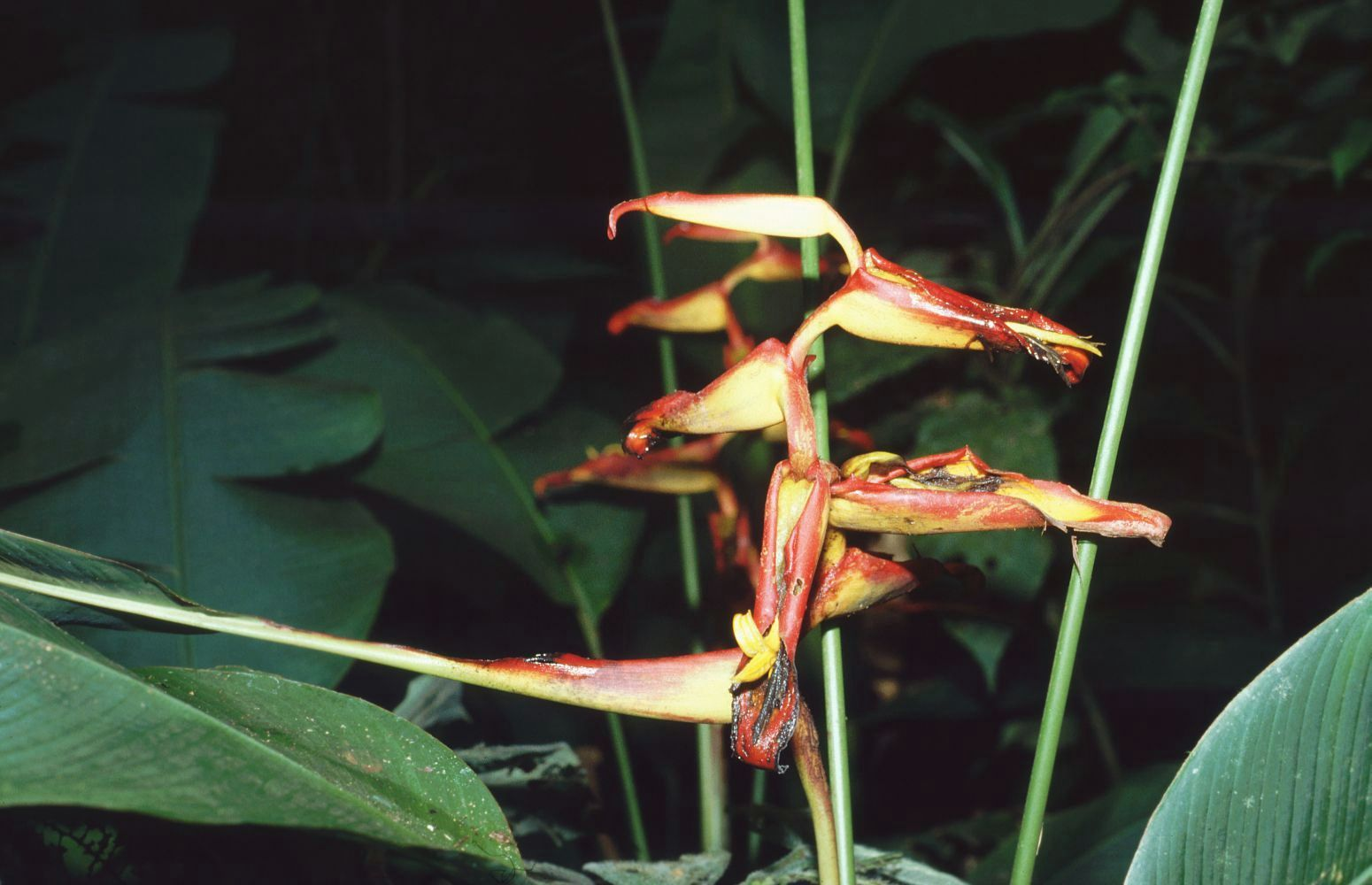 Heliconia irrasa, Heliconiaceae - Costa Rica: Prov. Puntarenas, PN Piedras Blancas, Bosque Esquinas bei La Gamba